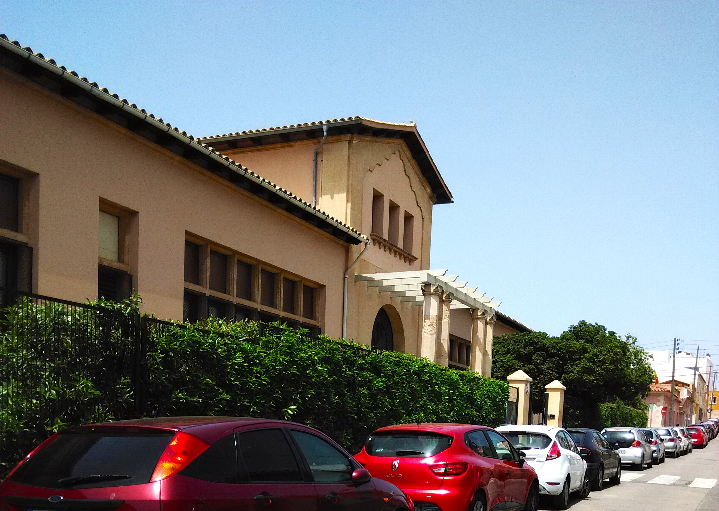 Escola Pública Coll den Rabassa. Vista Carrer Brunete